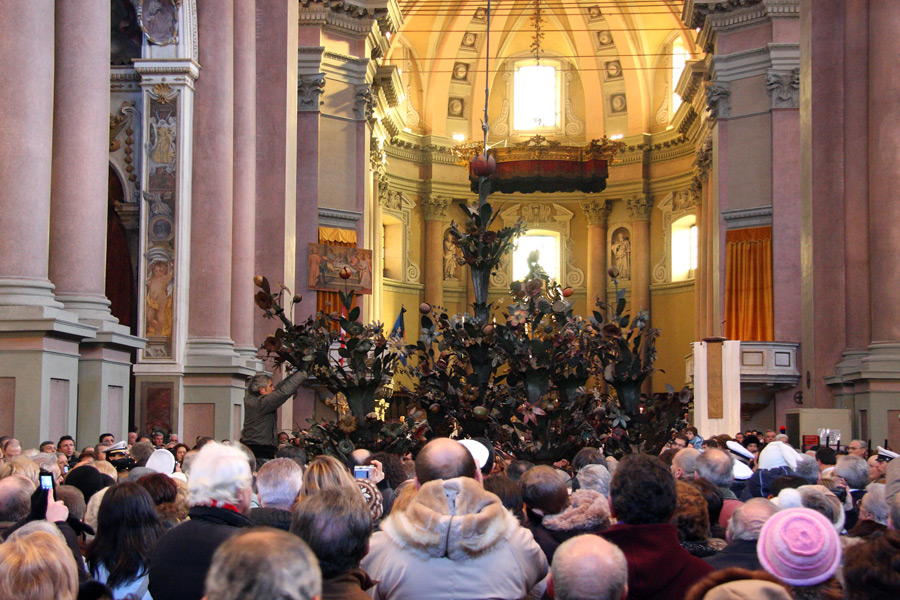 La cerimonia del fiore nella basilica di San Gaudenzio a Novara, durante la celebrazione della festa patronale (22 gennaio).